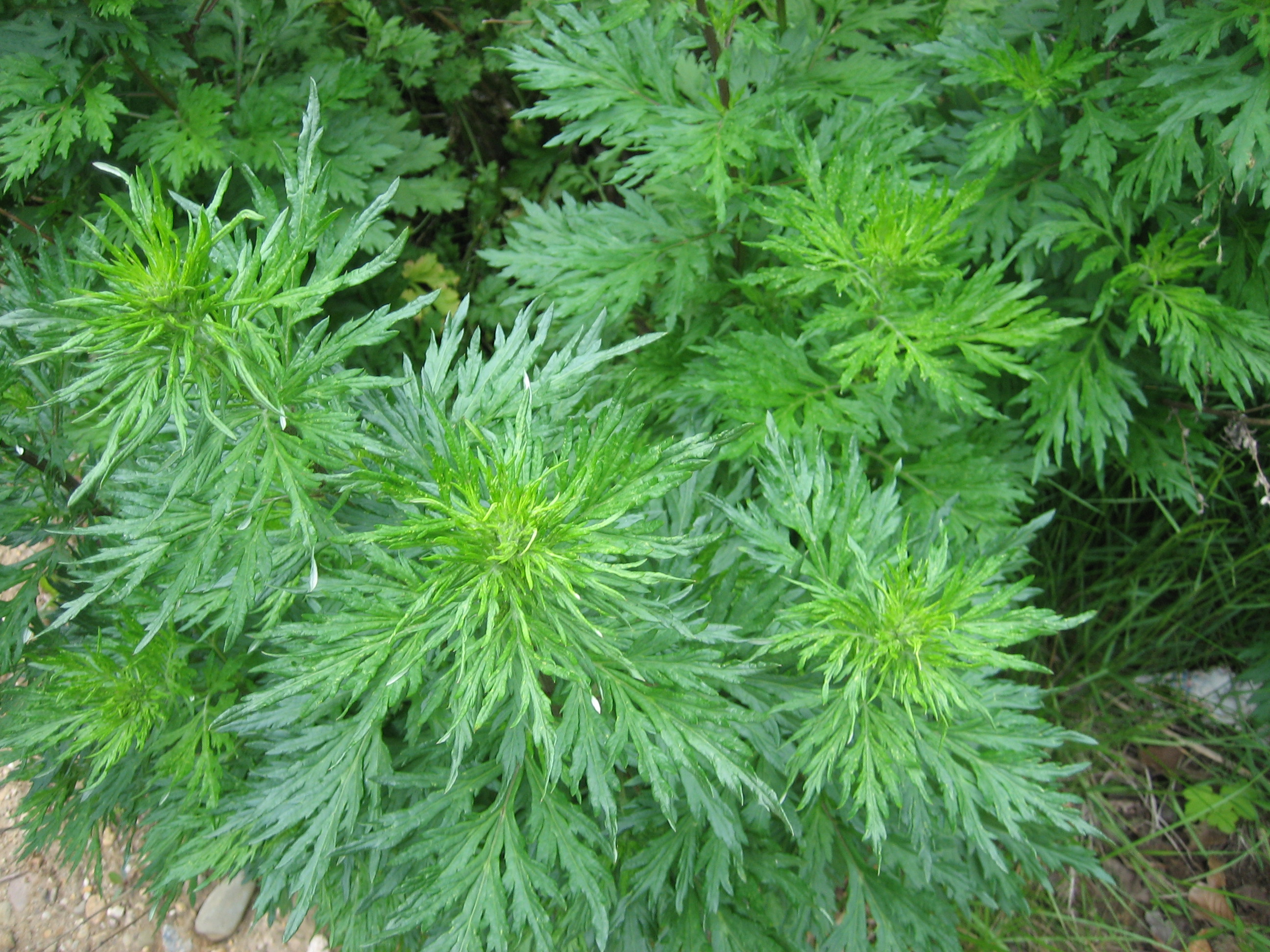 Beifuss, im Spätfrühling Autor(en): Rita Erfurt Bildbeschreibung: Beifuss